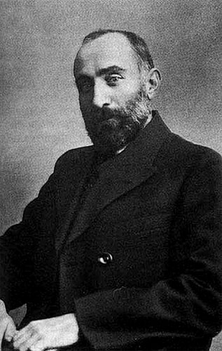 Nikolaj Semёnovič Čcheidze